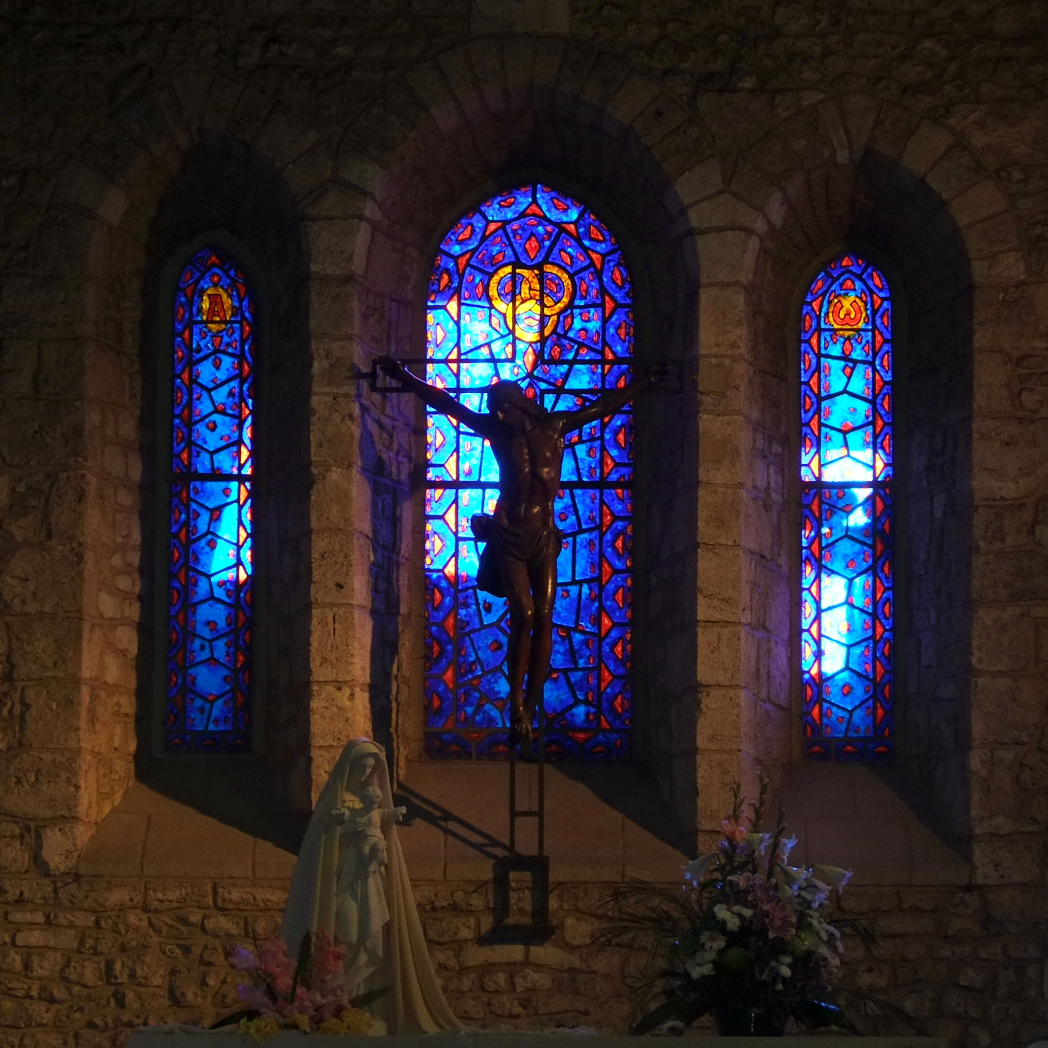 Bleiglasfenster in der Kirche Saint-Helier in Beuzeville im Département Eure, Frankreich; Darstellung: ?